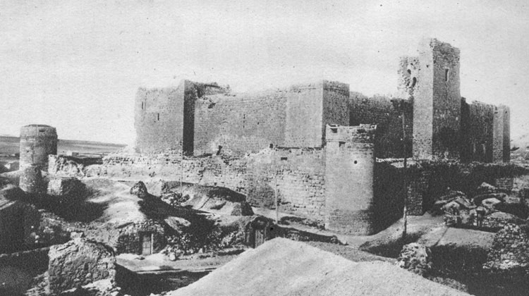 Castillo - Trigueros del Valle (Valladolid) - España Turística y Monumental / Cuarto álbum / Las Bellezas de Castilla / Región Leonesa - Cromo 120 x 70 Sepia